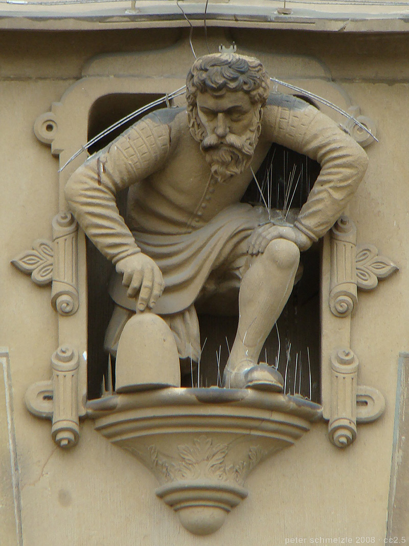 Detail zwischen Portal und Kunstuhr am Rathaus in Heilbronn